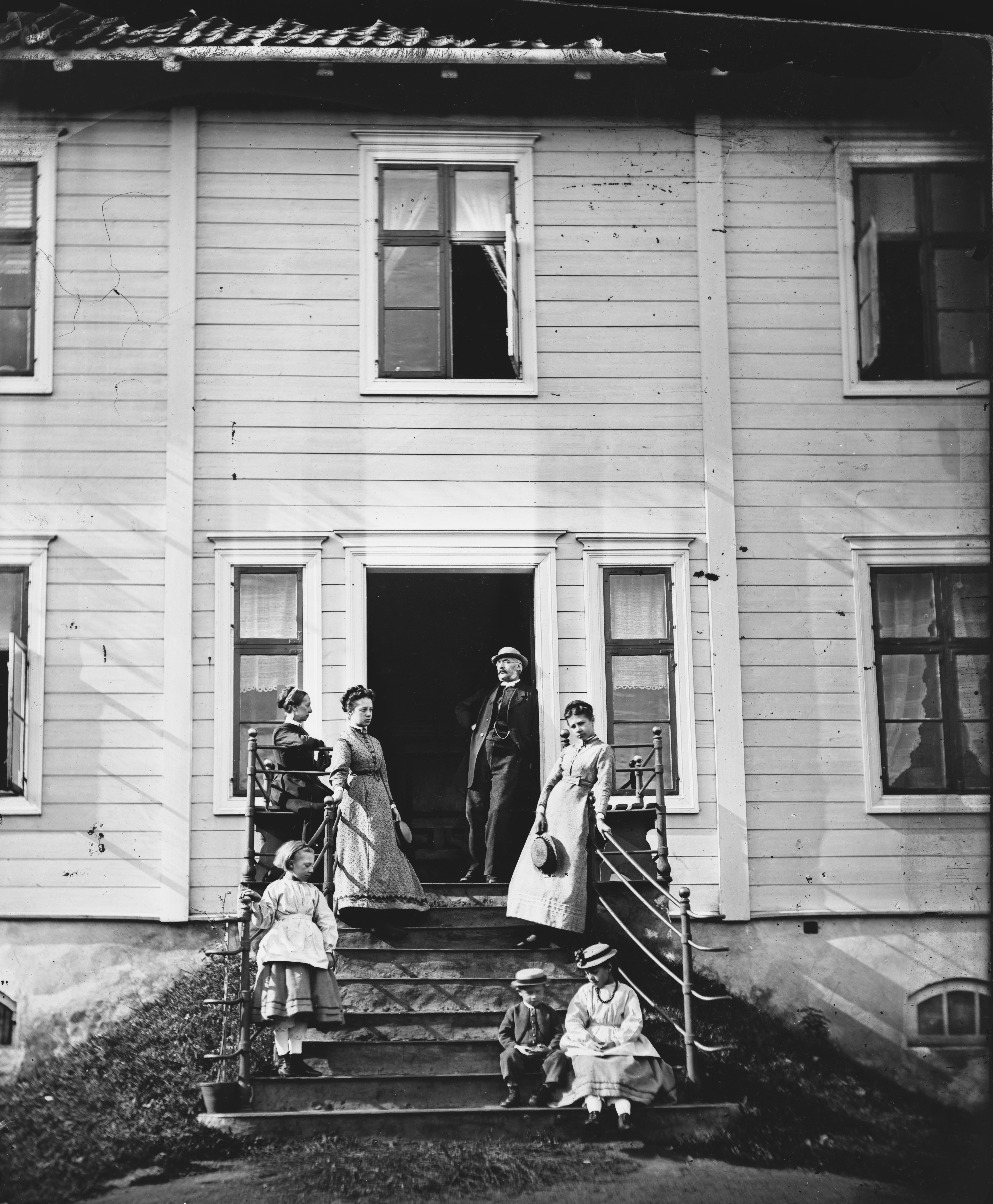 Sted: Jønsberg Kommune: Stange Fylke: Hedmark Tagger